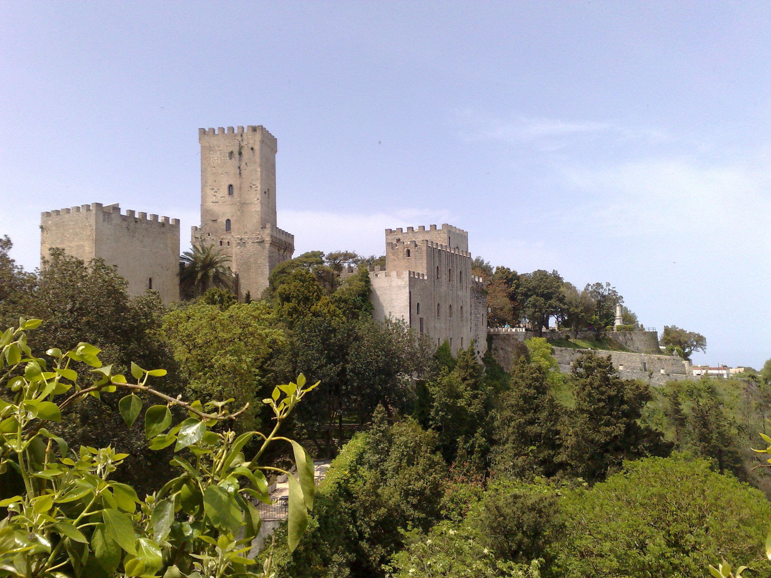 Erice Castle - Castello del Balio - Erice (Trapani)